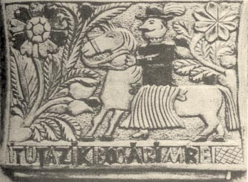 Színezett tükrös, domború faragással. Felirata: „Itt utazik Bogár Imre